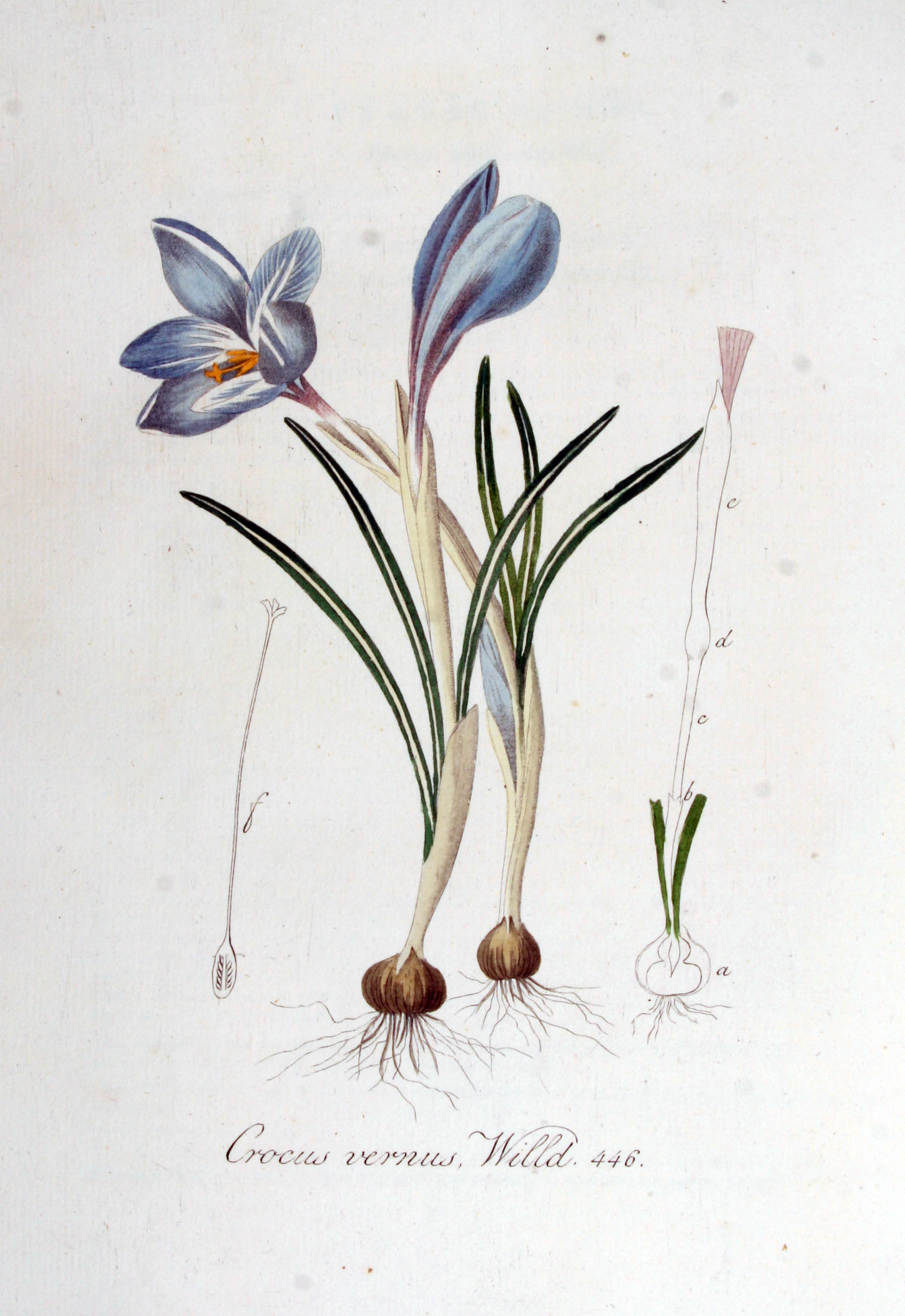 Crocus vernus (L.) Hill